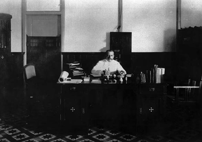 Foto. De heer Hens, assistent-resident te Ende, achter zijn schrijftafel